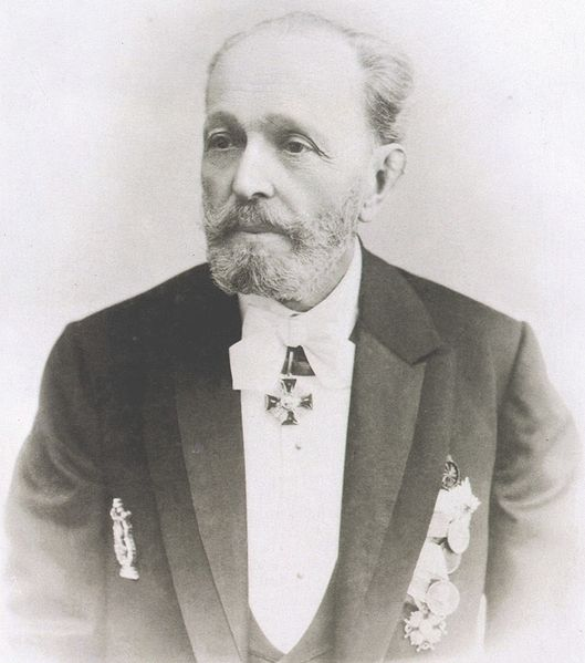 Portrait de Marius Petipas